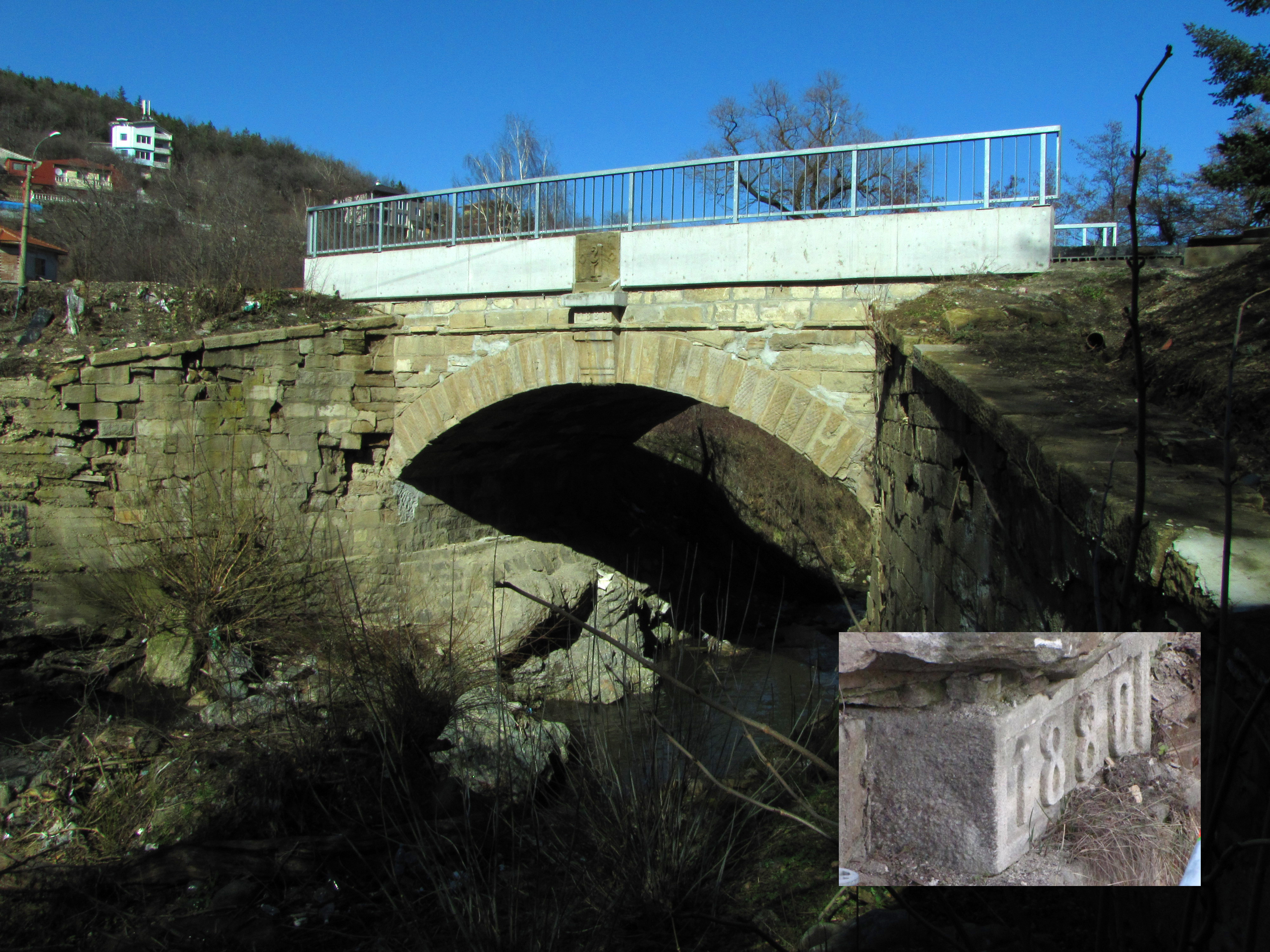 Снимката е направена от западната страна на моста, където има изграден нов подход за наблюдение от туристи. От там се вижда сводовия камък с годината на построявене на моста, който е осветен с енергоспестяващо осветление, и монограмът на княз Александър Батенберг.